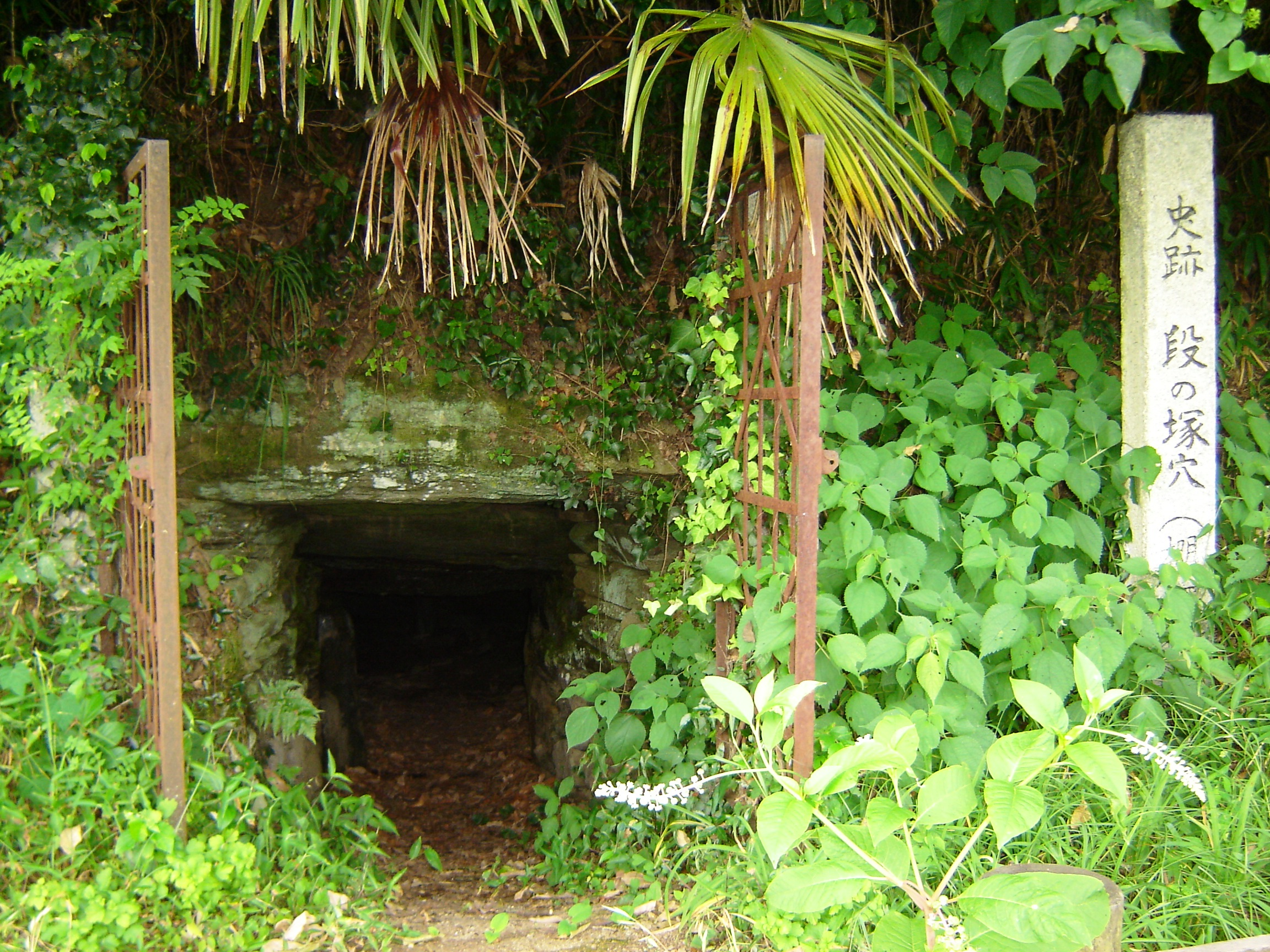 This is the entrance to the Tana-tsuka tomb in Mima-shi, Tokushima-ken, Japan